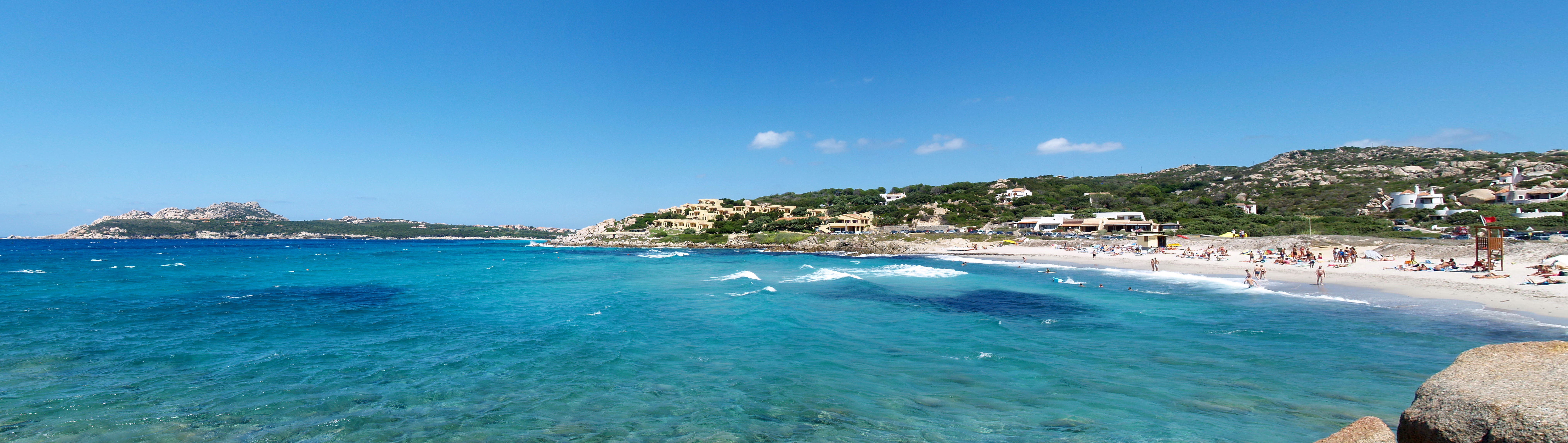 Panoramica di Baia Santa Reparata, Santa Teresa Gallura, Sardegna, Italia.